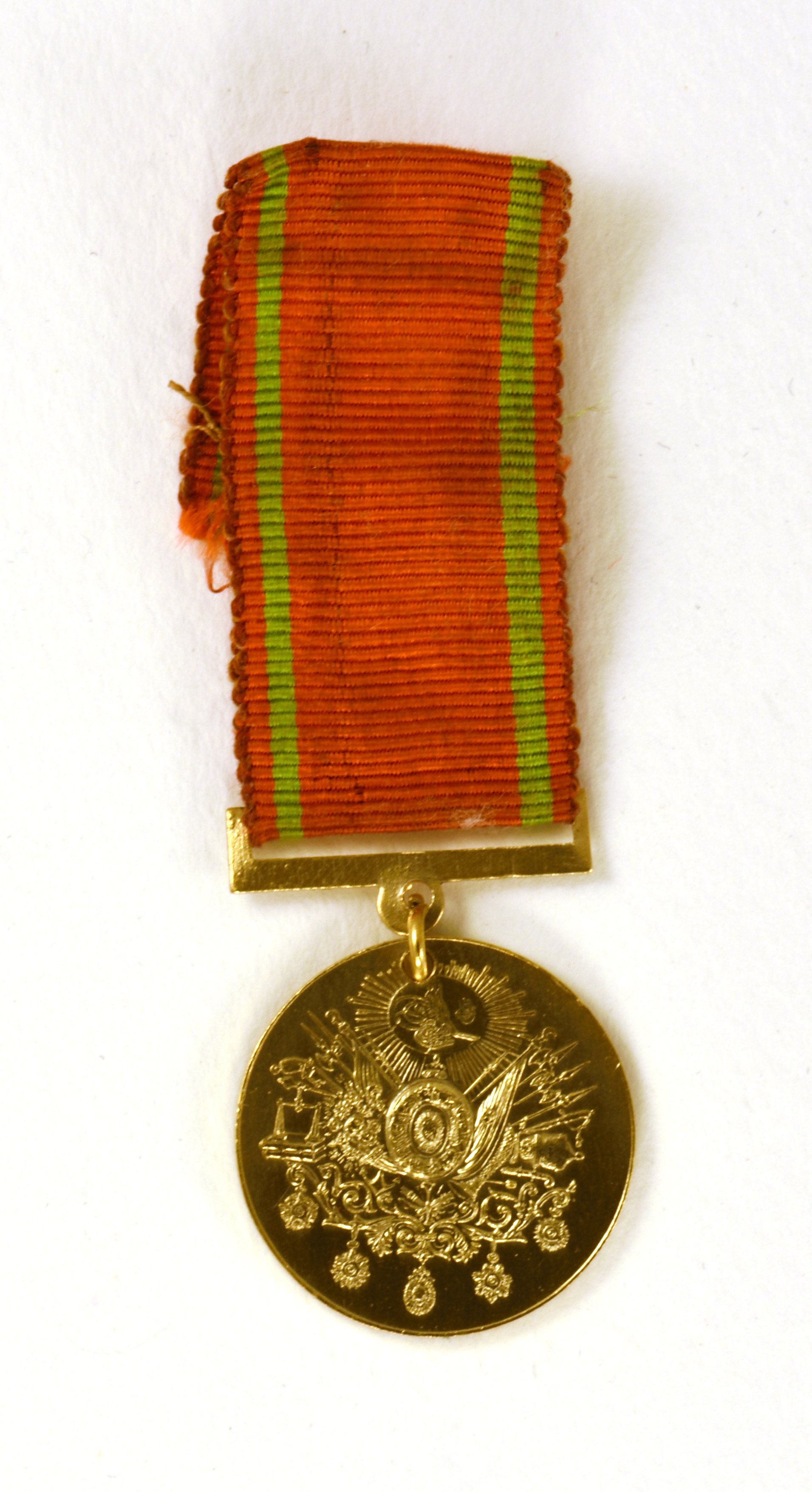 Ottomański Złoty Medal Walecznych - miniatura, awers)